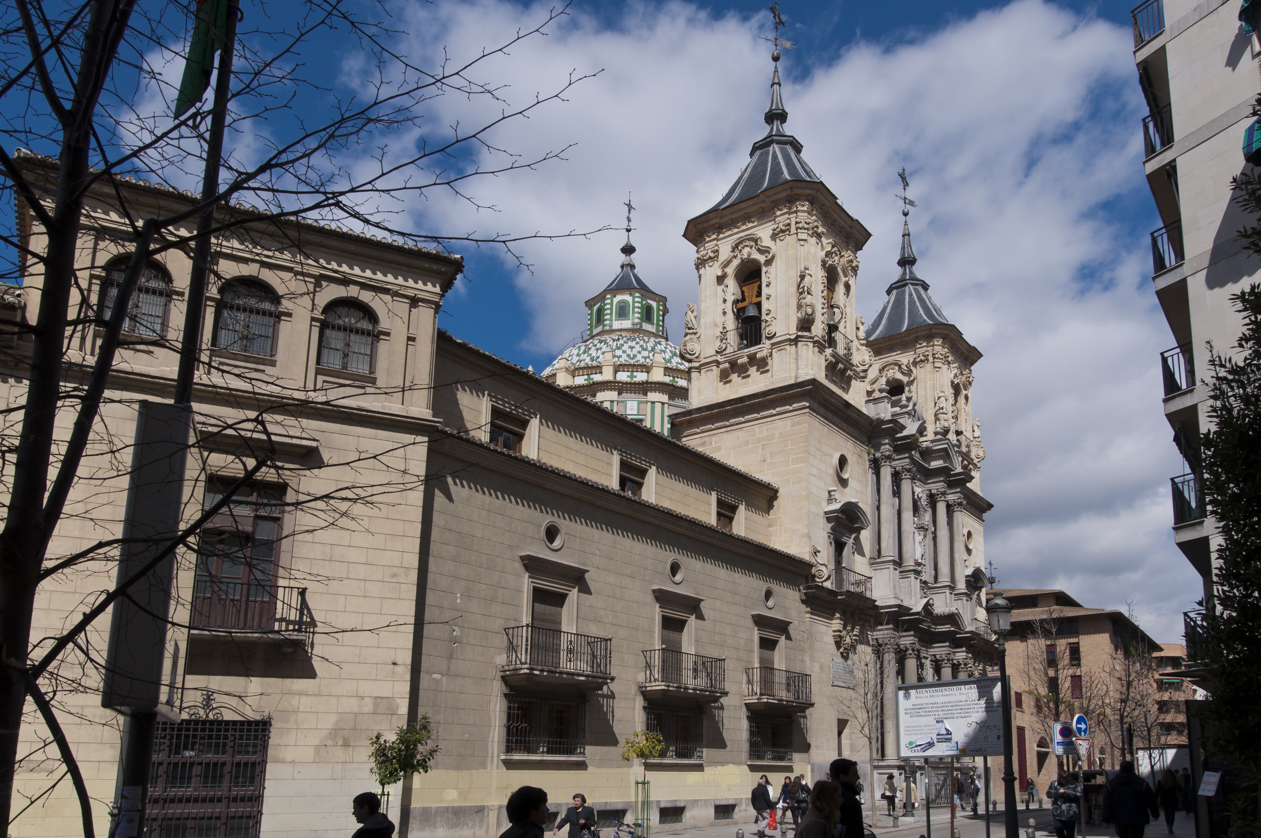 Iglesia de San Juan de Dios in Granada, Spanje